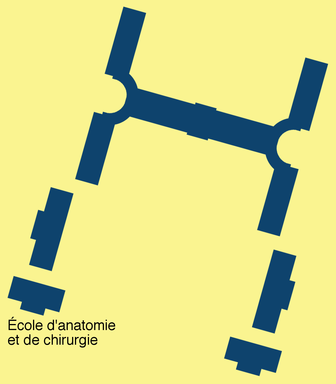 Plan de l'hôpital de la Marine de Rochefort (Charente-Maritime) tel qu'il était au XVIIIe siècle (quelques changements ont été apportés par la suite aux deux extrémités nord, et aussi à l'extrémité ouest du bâtiment principal). Ouvert en 1788, il s'appelait alors « hôpital de la Butte ». D'après un plan d'époque de Rochefort. J'ai réorienté « nord en haut » en me fiant à des plans récents.